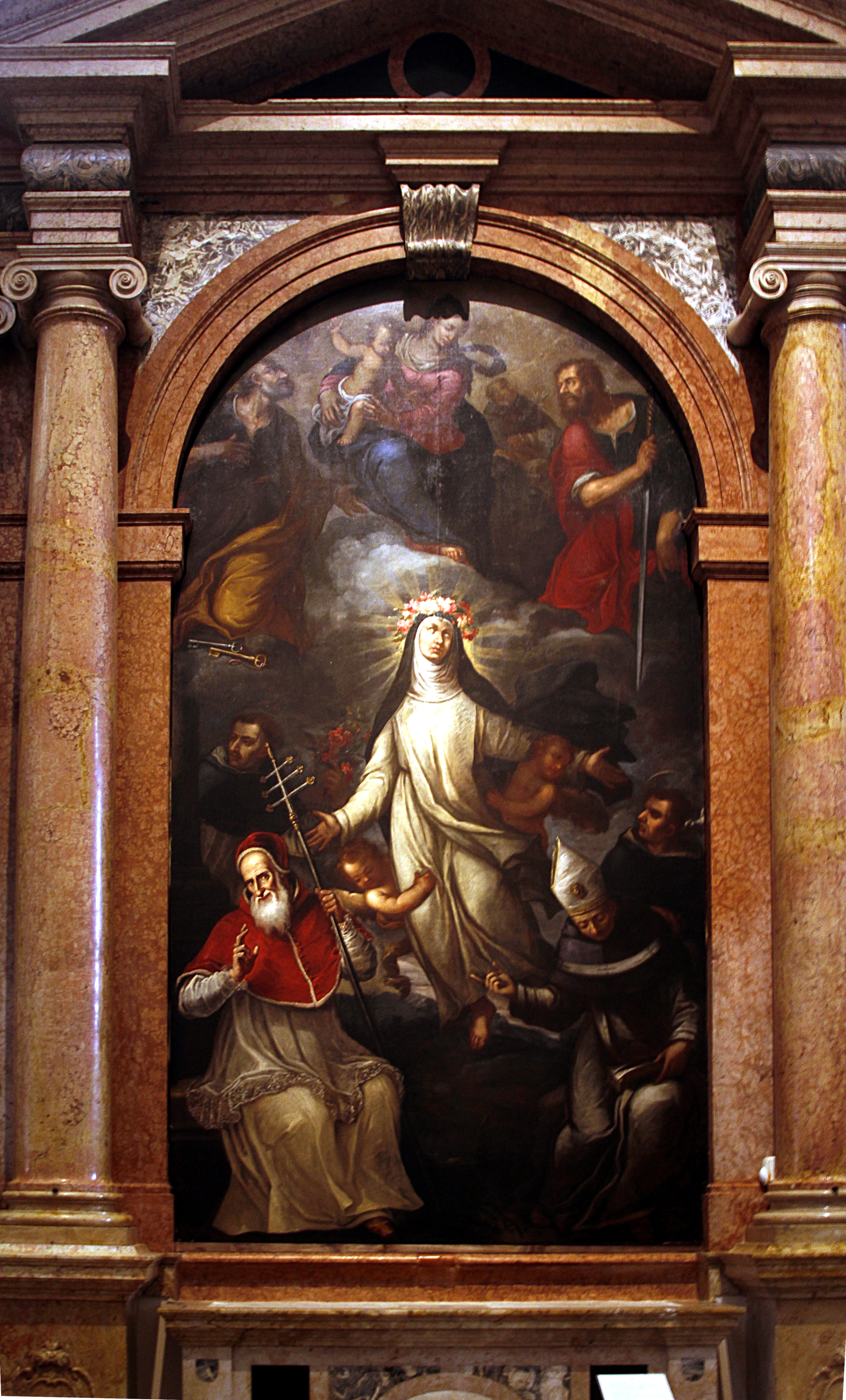 Sant'Anastasia - Verona